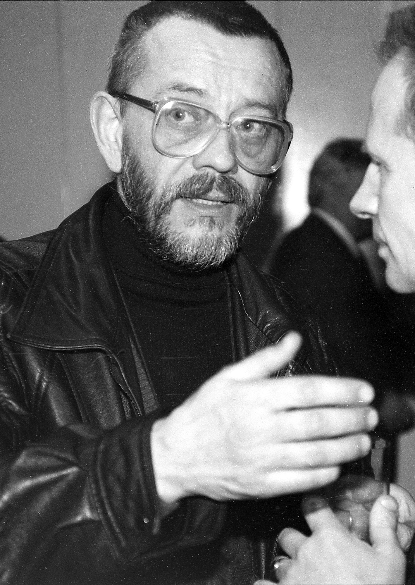 Kalju Komissarov Viljandi Missi valimisel 1992